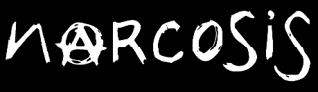 Logotipo de la banda de punk.